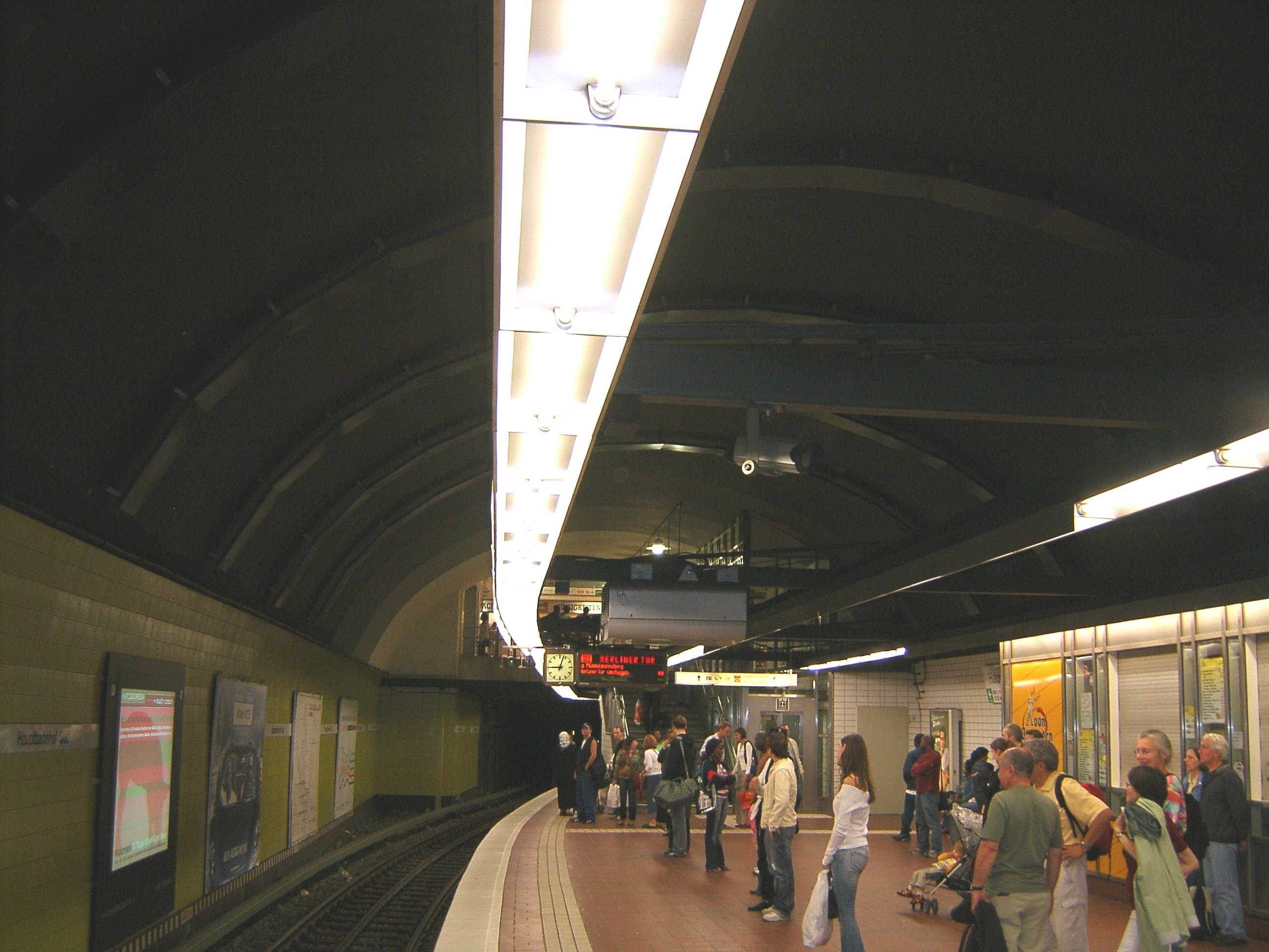 Hamburg, Hauptbahnhof, U-Bahnstation Hauptbahnhof-Süd